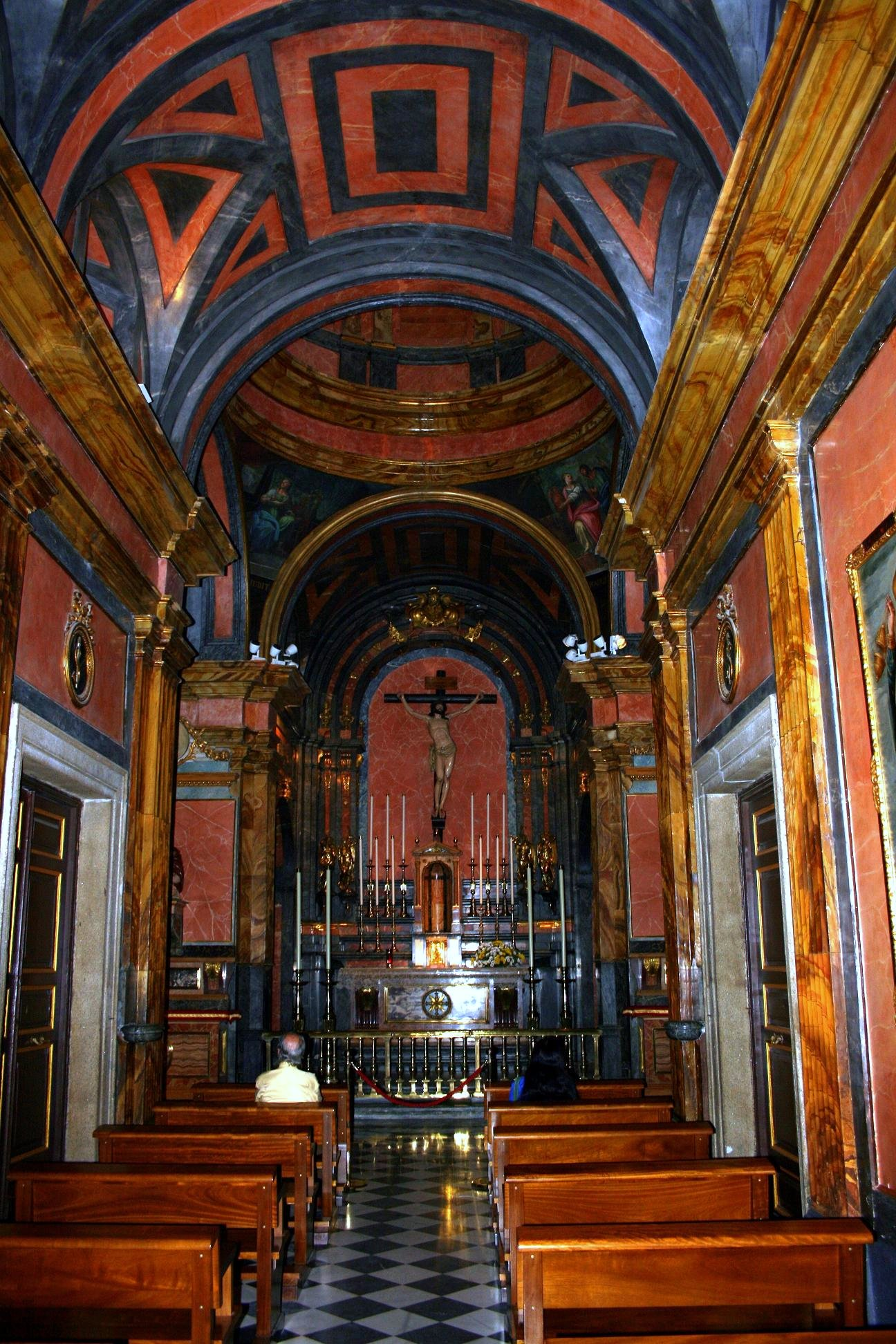 Interior de la Capilla del Santísimo Cristo de la Redención en la parroquia de San Ginés (Madrid), obra de Juan Ruiz (1646-1672), Bartolomé Zumbigo y Sebastián de Herrera Barnuevo (presbiterio). Talla del Crucificado de Alonso Giraldo Bergaz, primera década del siglo XIX.